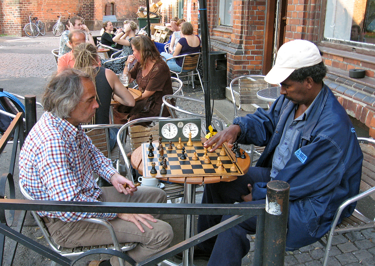 Två män spelar schack på ett café i centrala Lund 2007.